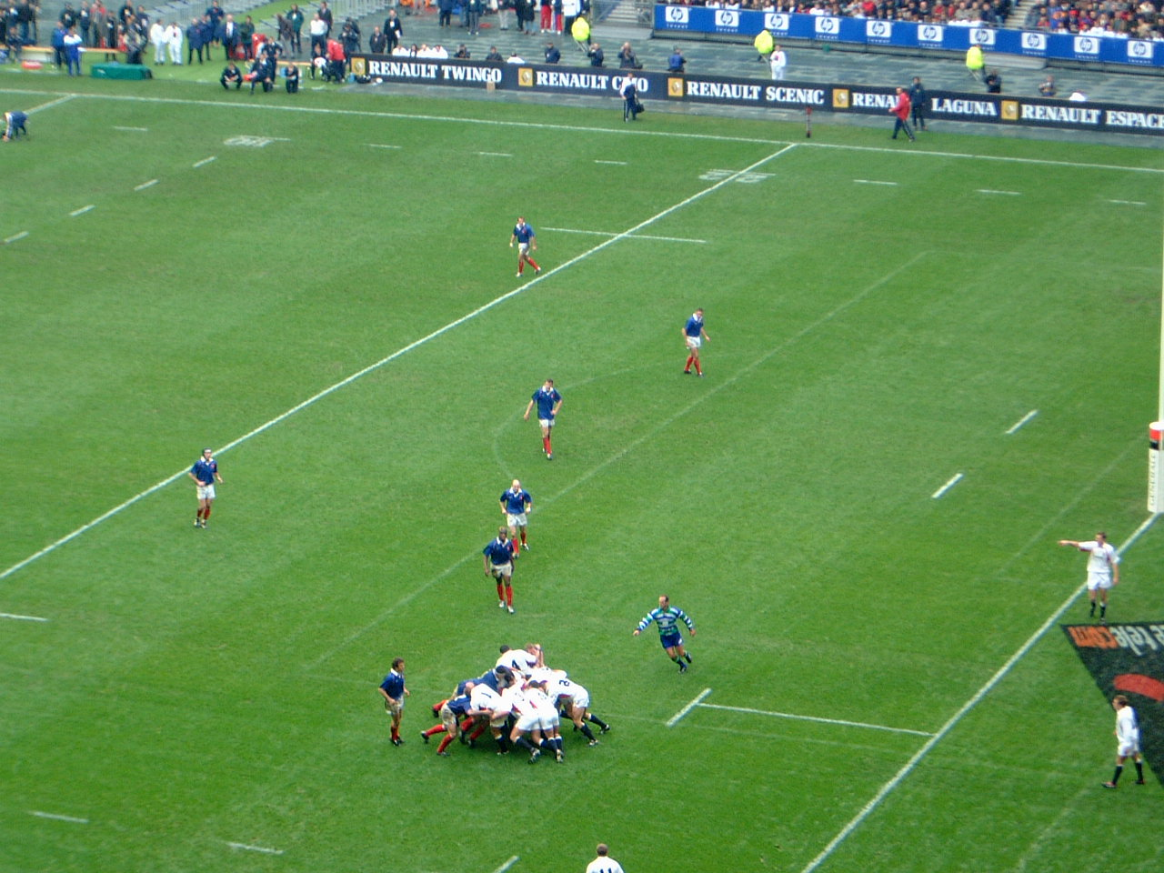 France-Angleterre Tournoi des VI Nations 02-03-2002